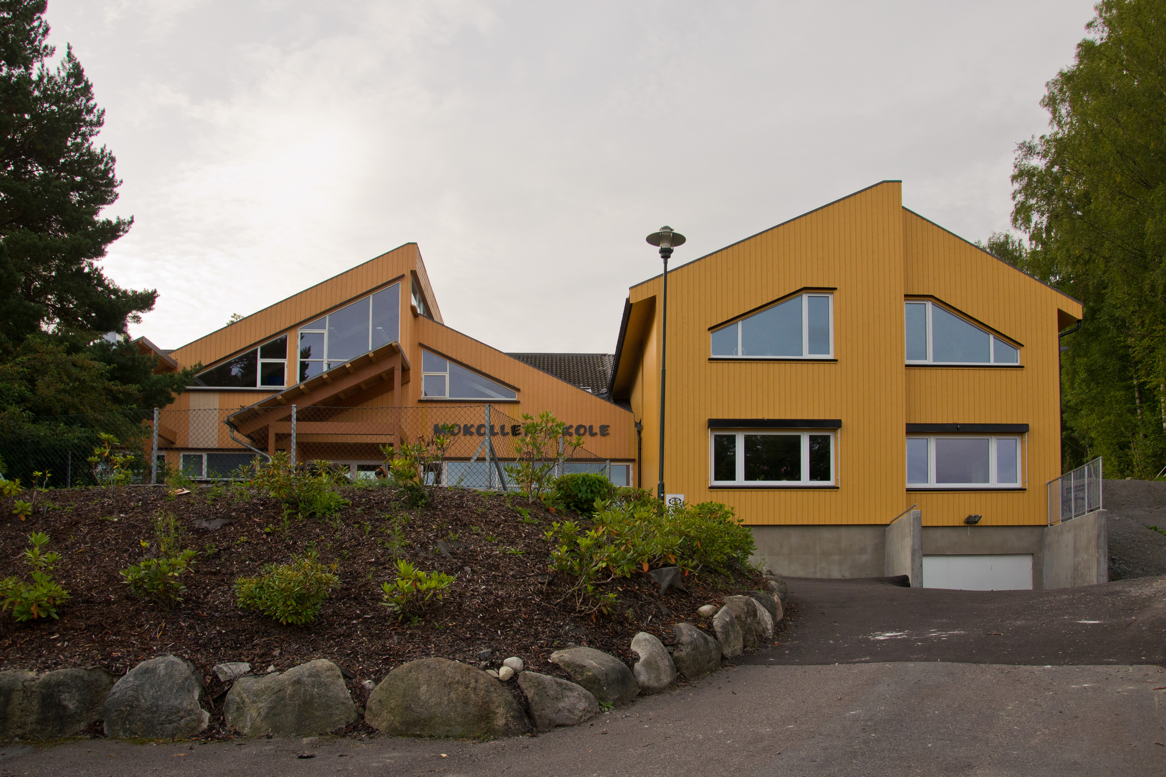 Mokollen skole i Sandefjord. Eies av adventistkirken.